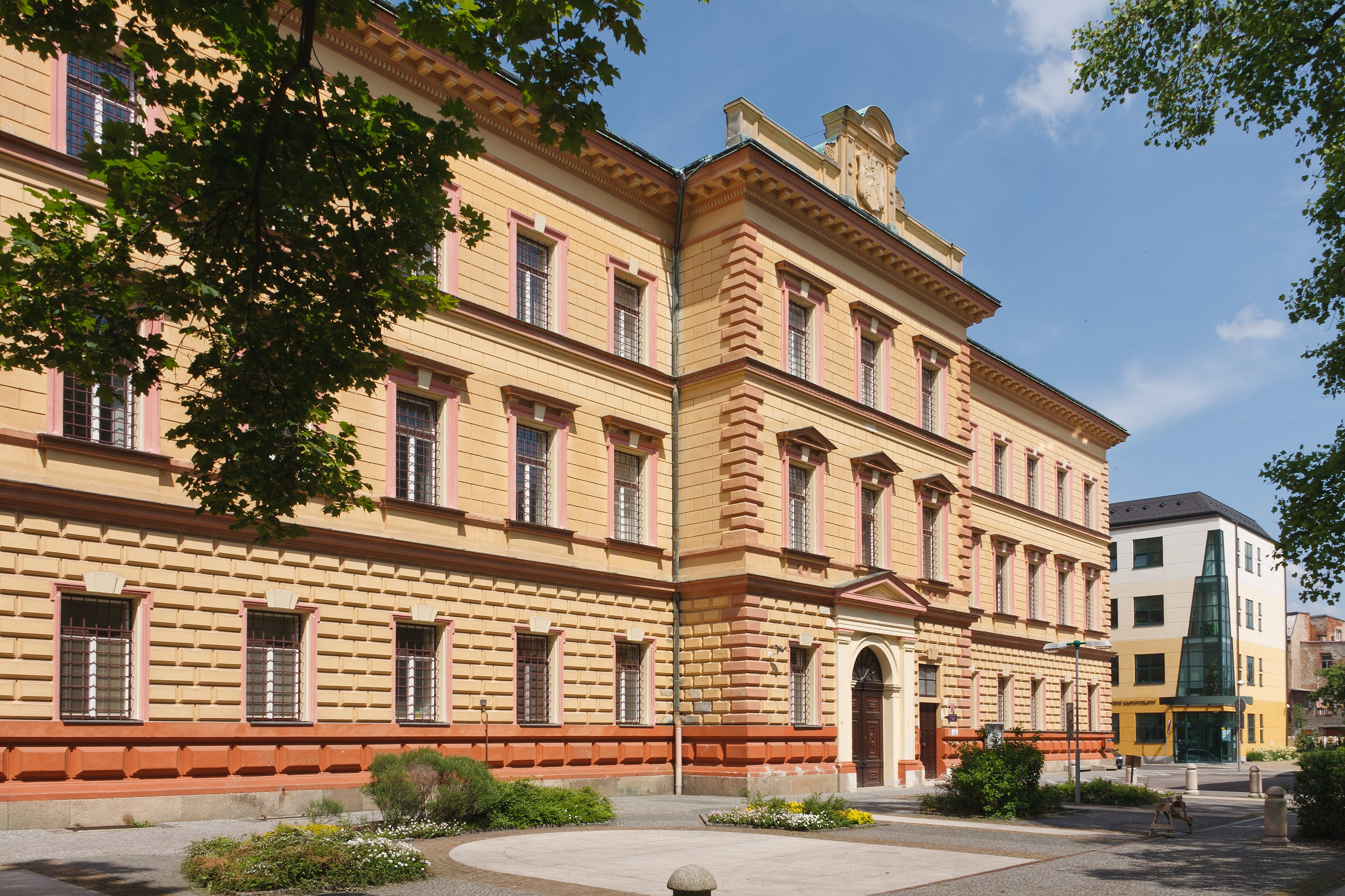 Budova vazební věznice v Liberci